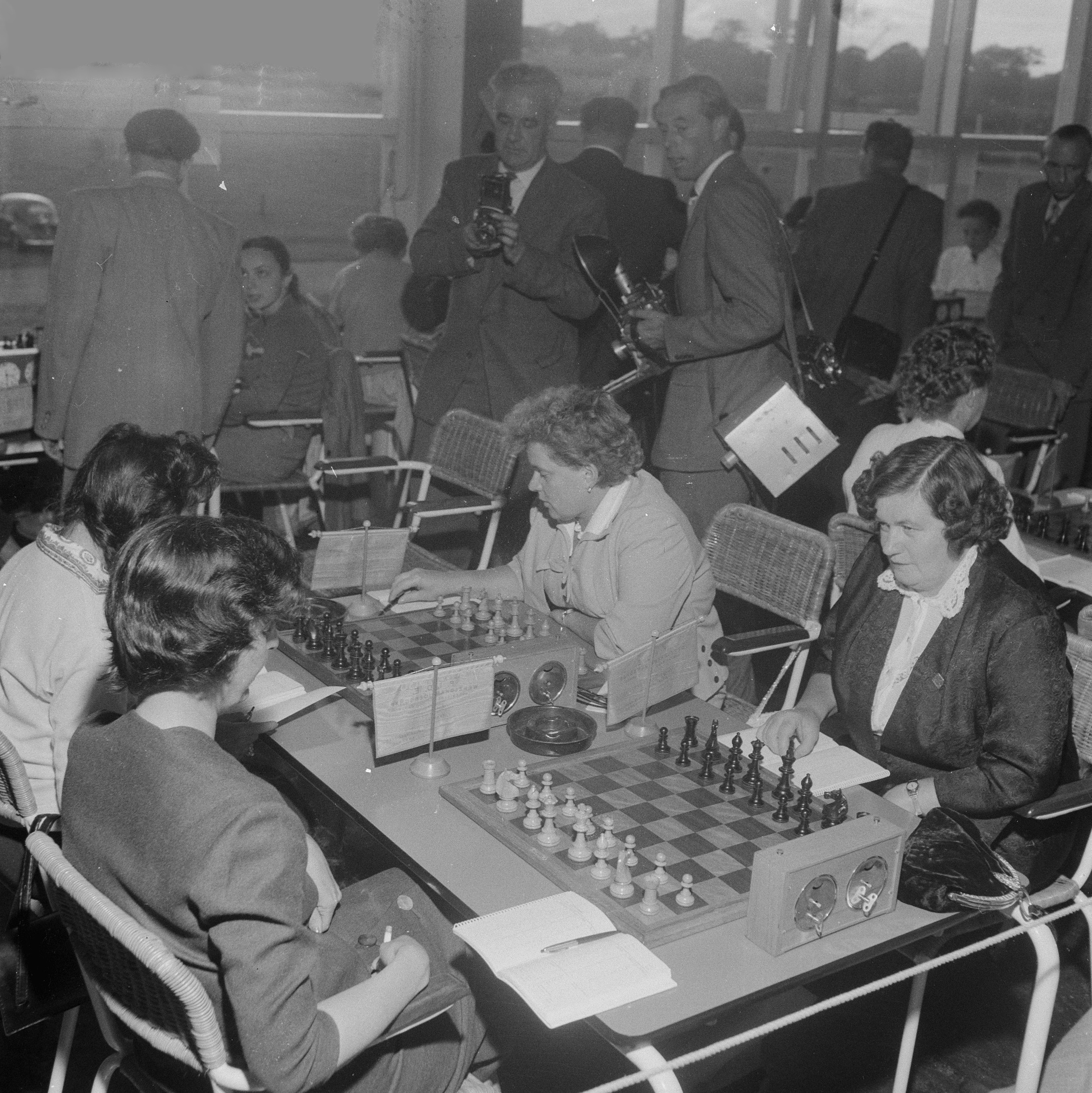 Collectie / Archief : Fotocollectie Anefo Reportage / Serie : [ onbekend ] Beschrijving : Eerste ronde Internationaal Damesschaaktoernooi te Emmen Russin Olga Rubtsova (rechts) en K. A. Zvorykina Datum : 3 september 1957 Locatie : Emmen Trefwoorden : Schaken, ronden Persoonsnaam : K. A. Zvorykina Fotograaf : Koch, Eric / Anefo Auteursrechthebbende : Nationaal Archief Materiaalsoort : Negatief (zwart/wit) Nummer archiefinventaris : bekijk toegang 2.24.01.03 Bestanddeelnummer : 908-9180